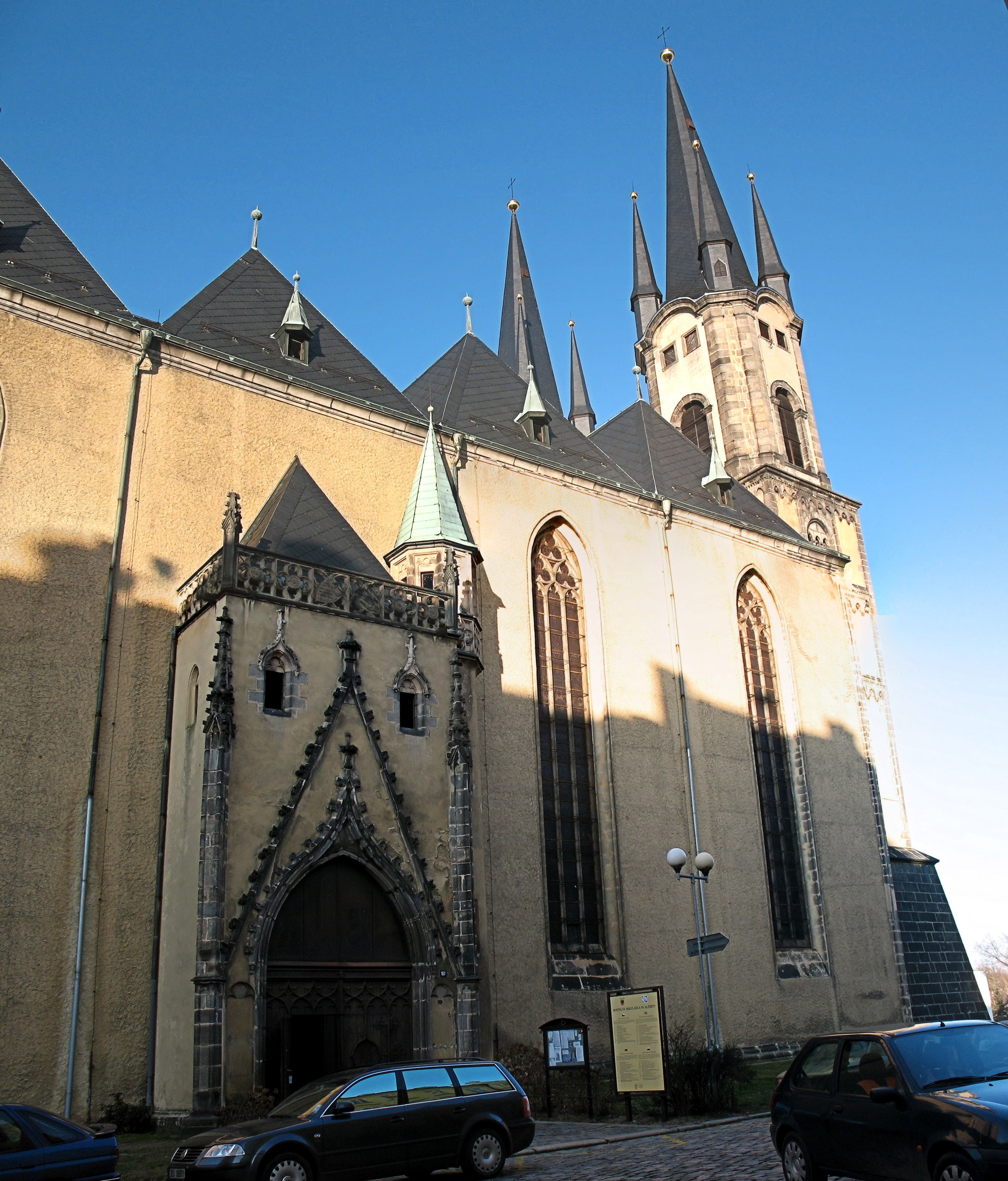 Tschechien, Eger, Kirche St. Nikolaus